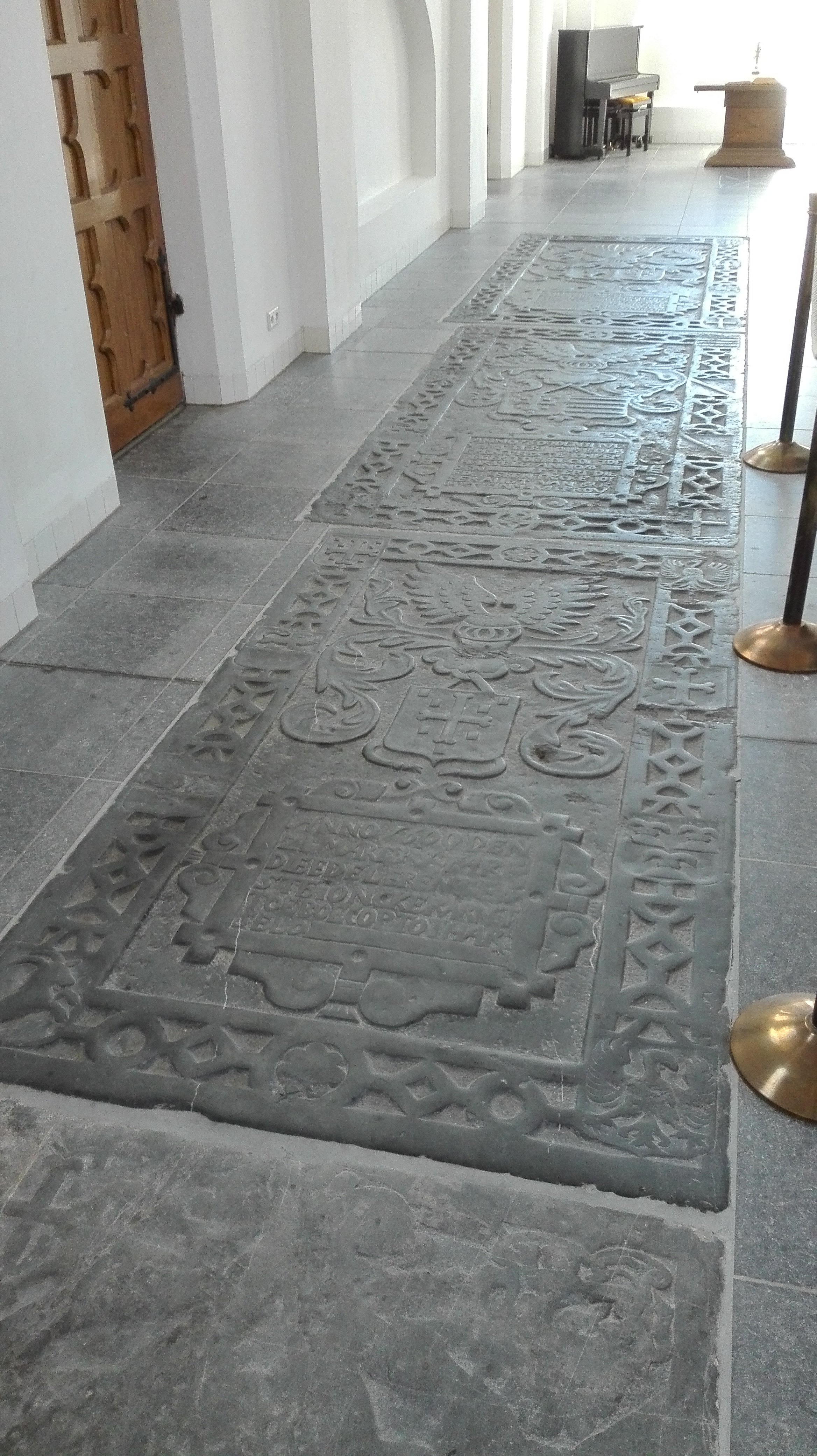 Oude Kerk Bennekom zijbeuk zuid Open Monumentendag 2016